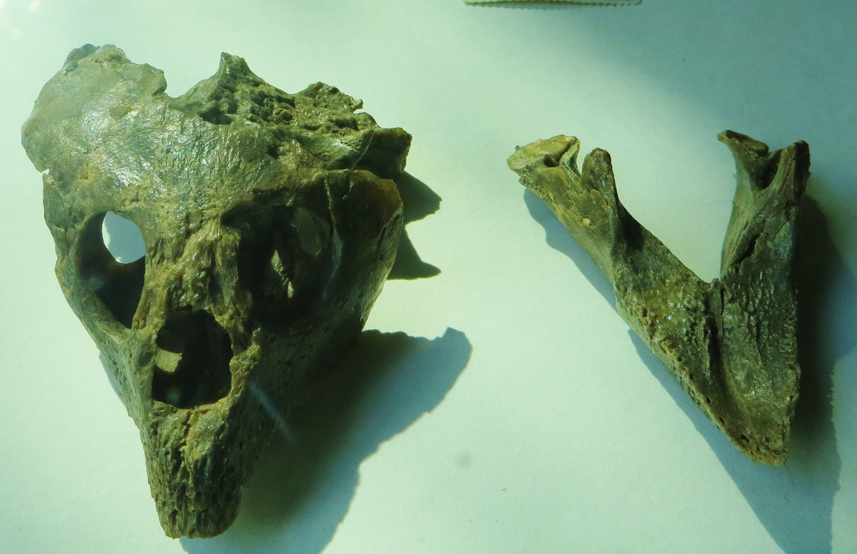 Fossil of Solnhofia, an extinct turtle- Took the picture at Teylers Museum, Haarlem